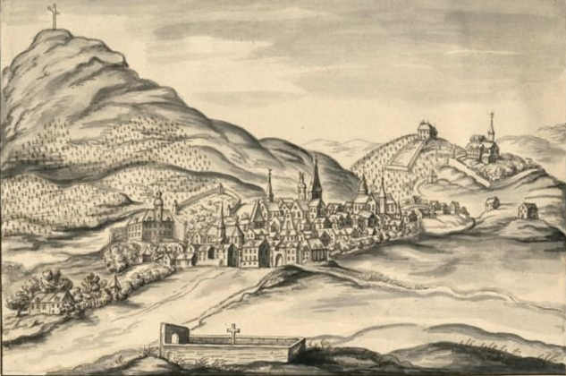 Vue de Vesoul au XVIIème siècle